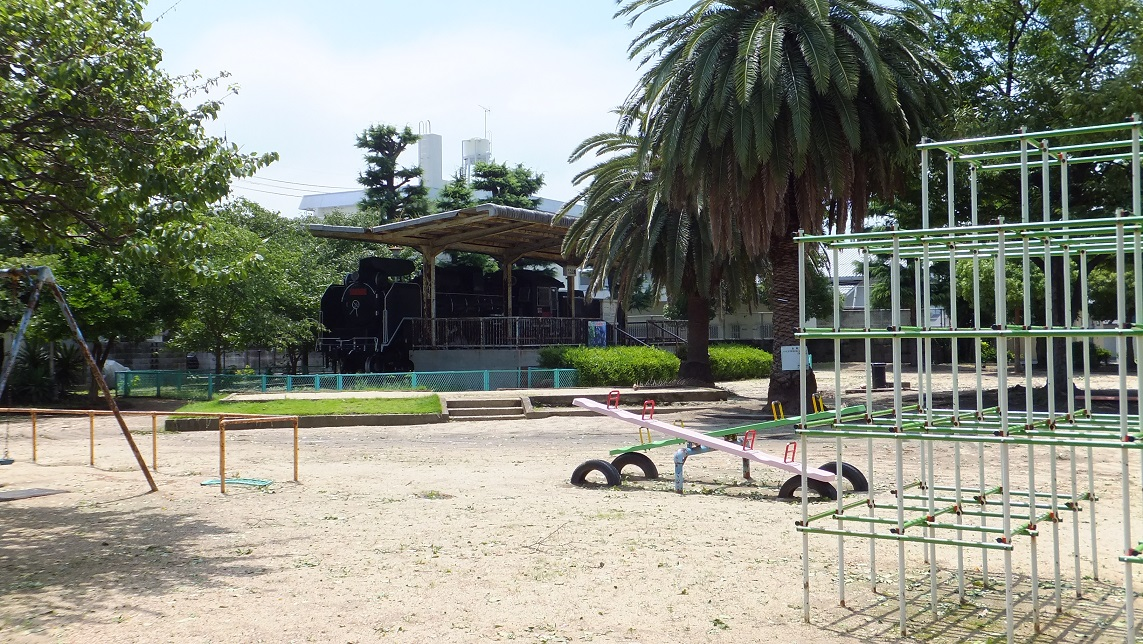 香川県高松市の高松市番町二丁目公園